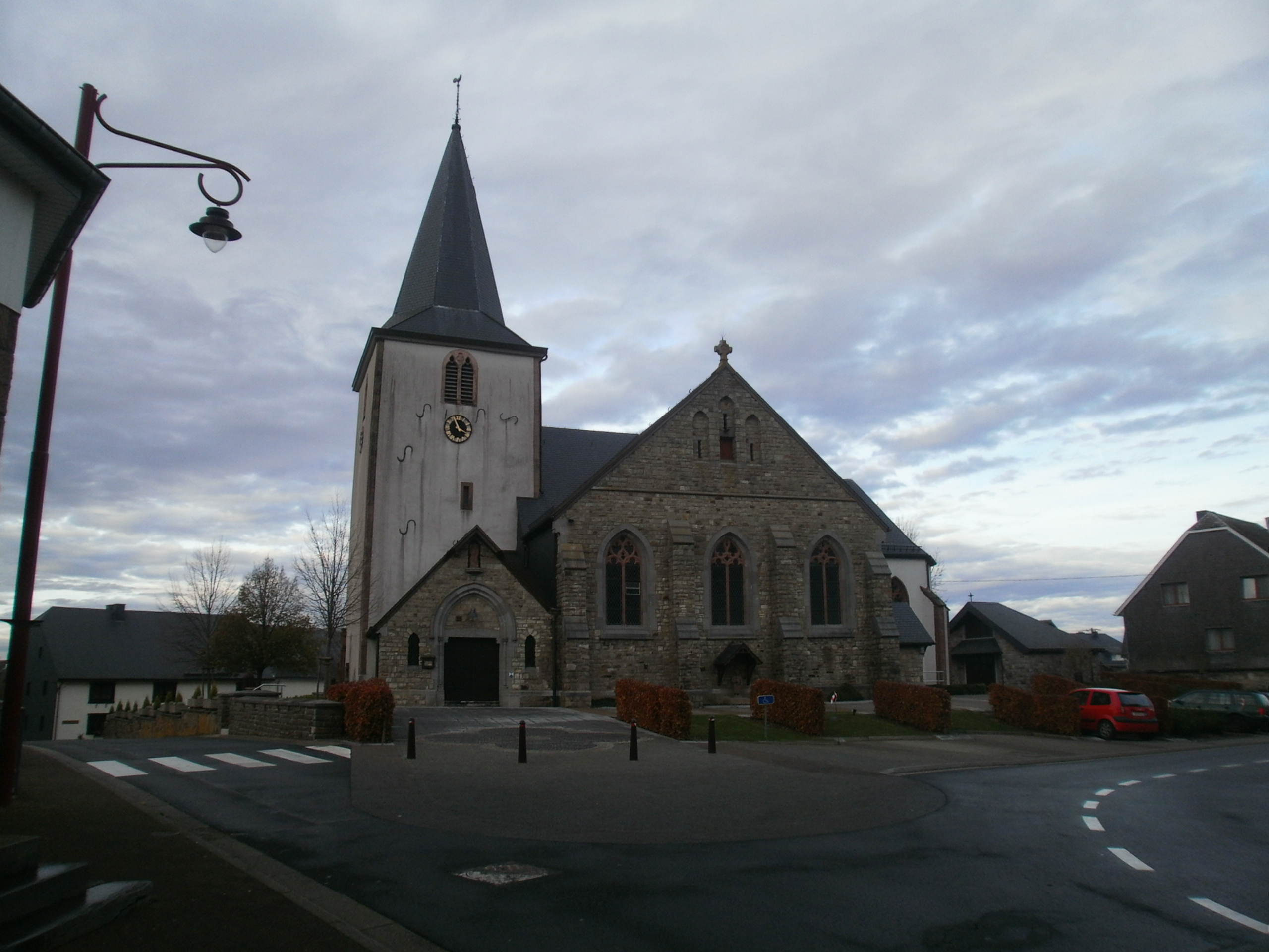 St. Eligiuse kirik linnakese keskel pärineb 1130ndatest aastatest. Vaade lõunast.